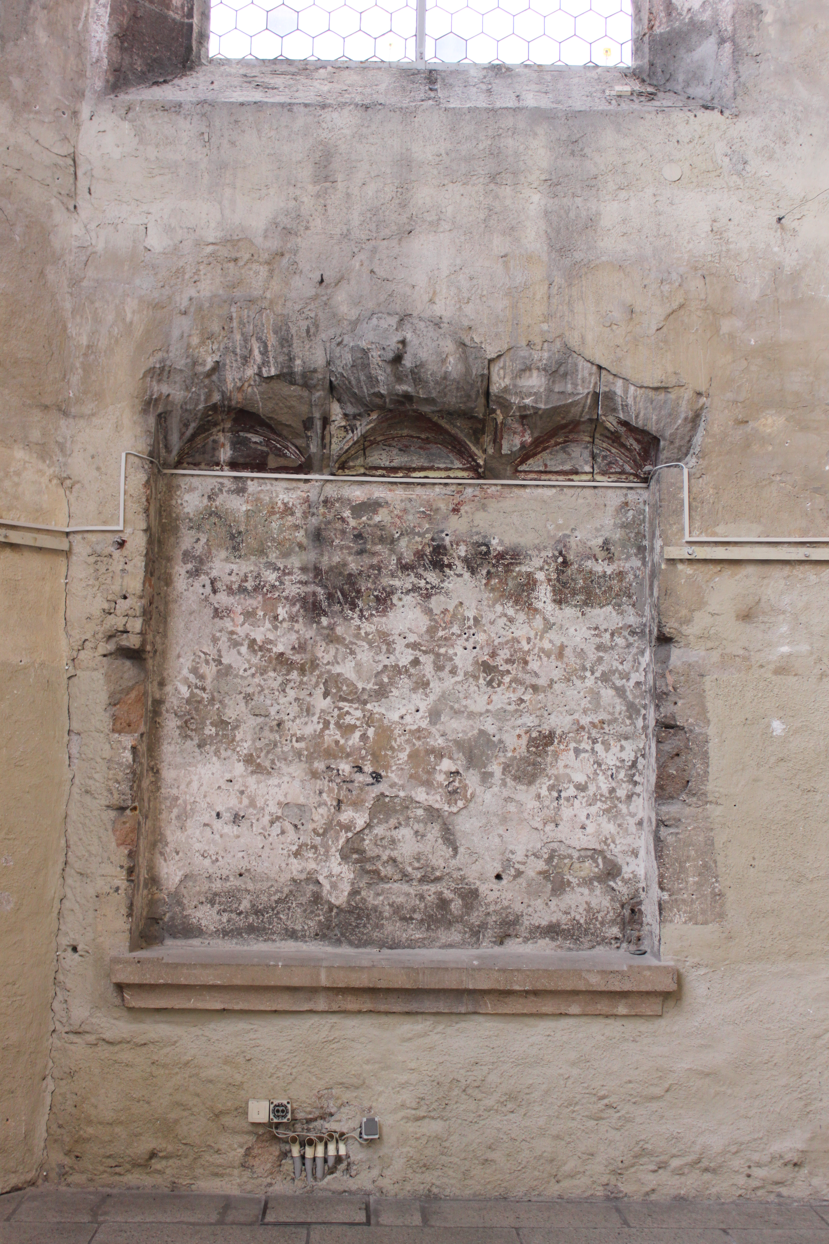 Ehemalige Dominikanerinnenkirche, Chor rechts, Sessionsnische, stark beschädigt, Sitzbank aus neuerer Zeit